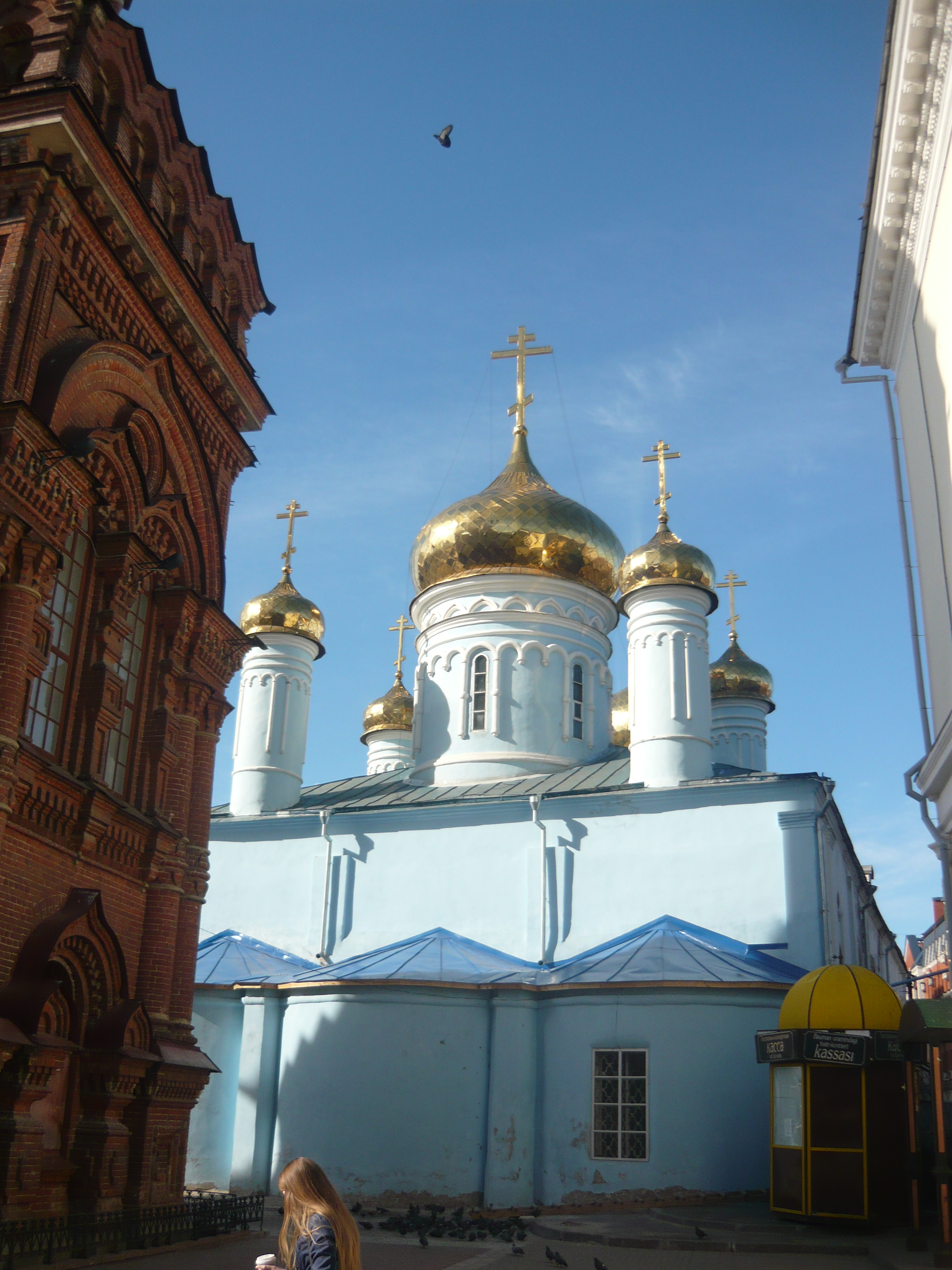 Богоявленский собор Казани